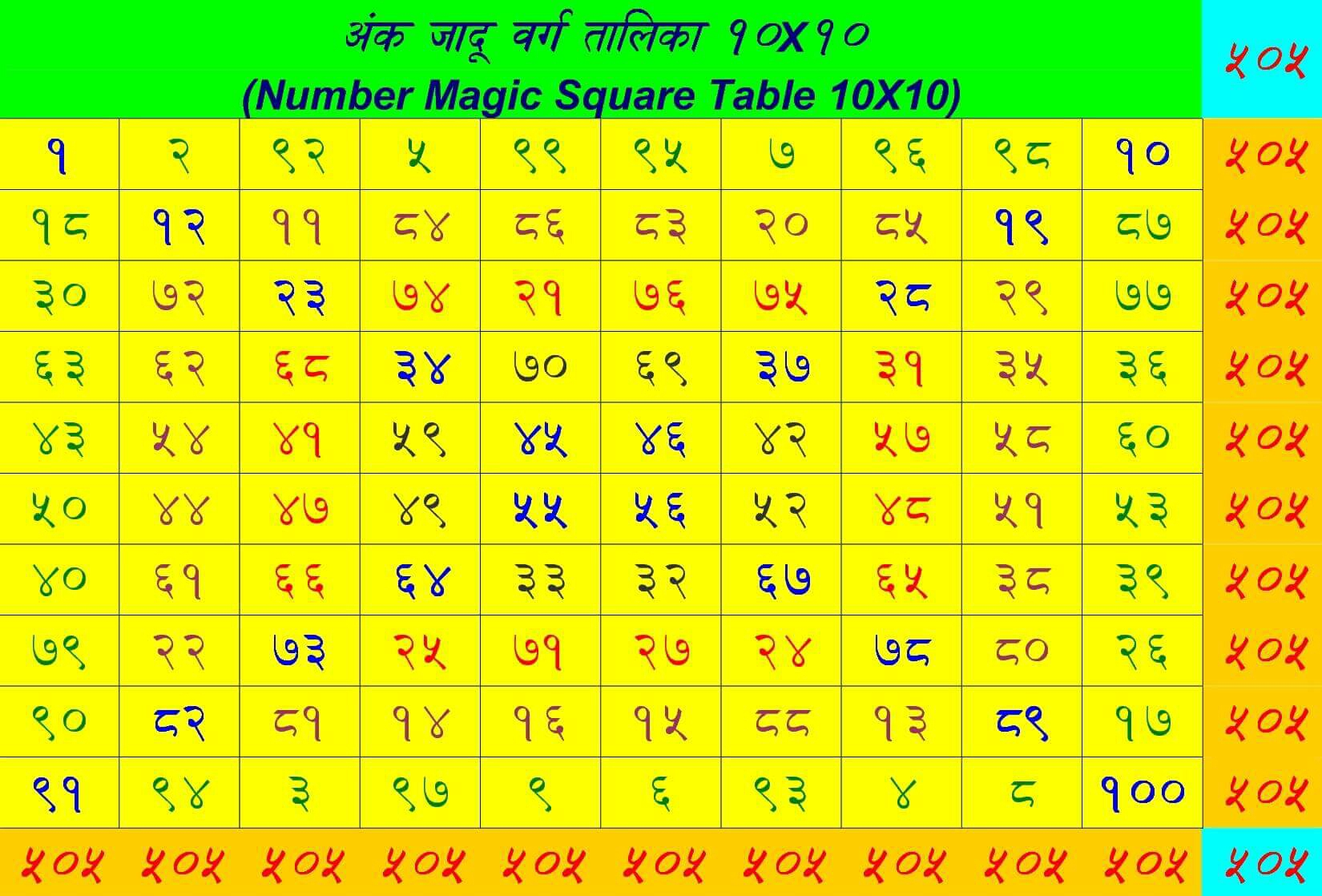 नेपाली: १०० कोठे अङ्क जादु वर्ग तालिका